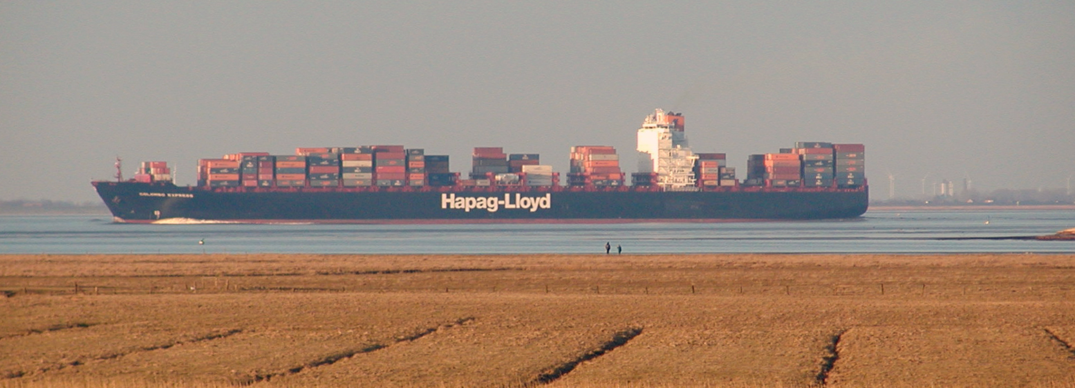 Das Containerschiff Colombo Express (8.750 TEU) (April 2005) bei der Oste Mündung bei Neuhaus (Oste). Dies Schiff war von März 2005 bis Juni 2005 das weltgrößte Containerschiff. Information about Colombo Express may be found at IMO 9295244.A ship can change name and flag state through time, but the IMO number remains the same through the hull's entire lifetime. As a result, it can be useful to identify a ship by using the IMO number.